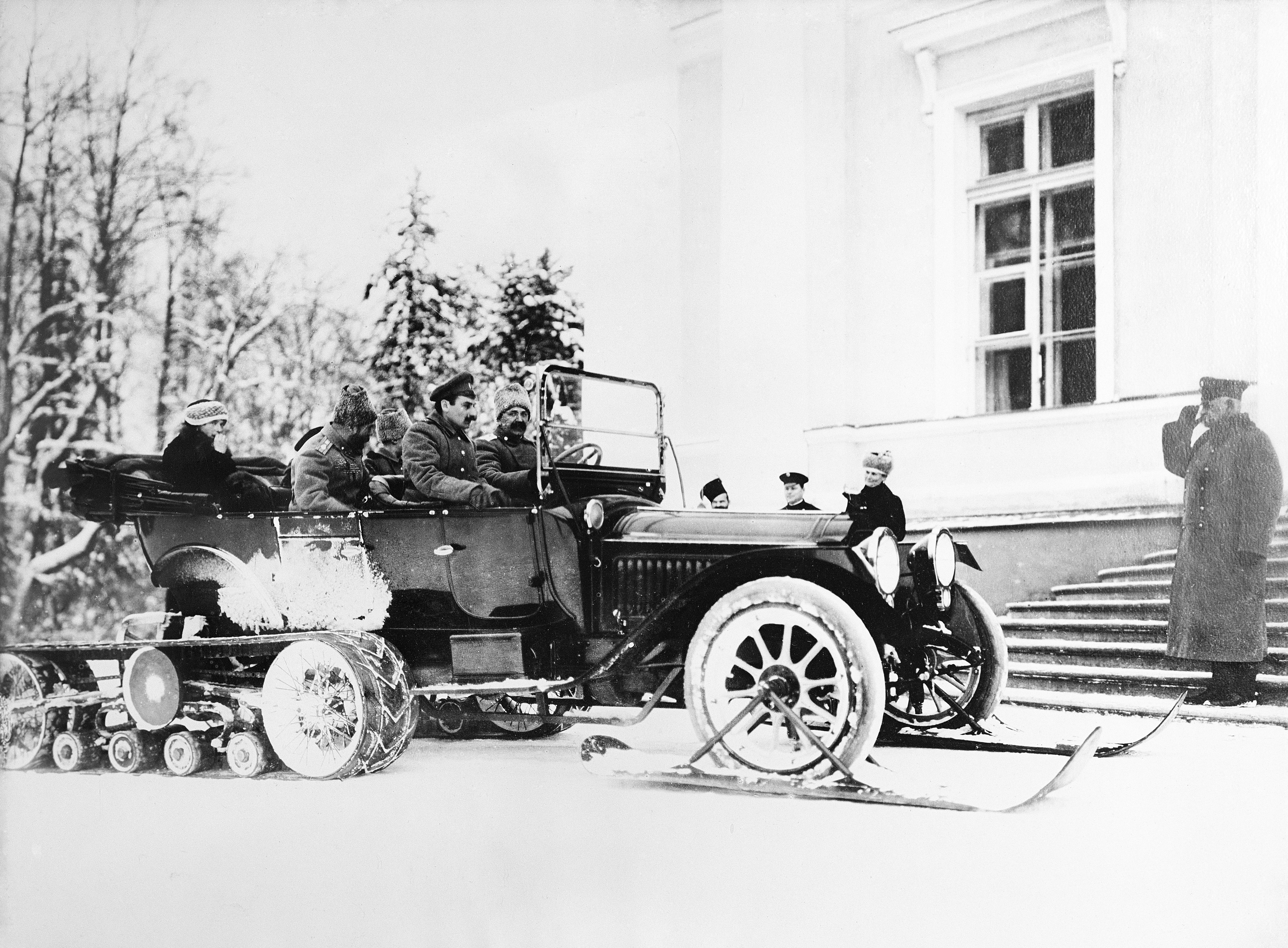 Automobil mit Schneeraupe und vorne SkiernDarin: Motorwagen DienstOriginal: Negativ; Glasplatte; Silberbromid; 13x18cmSignatur: CH-BAR#E27#1000/721#14095#5597*